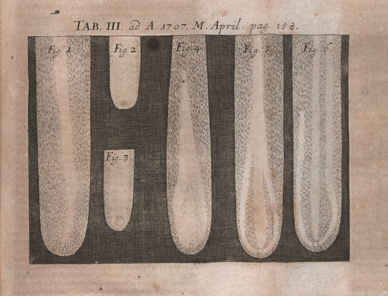 Illustration